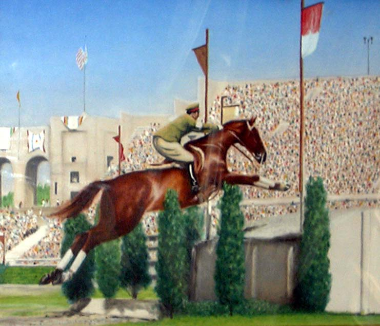 バロン西（投稿者が撮影）